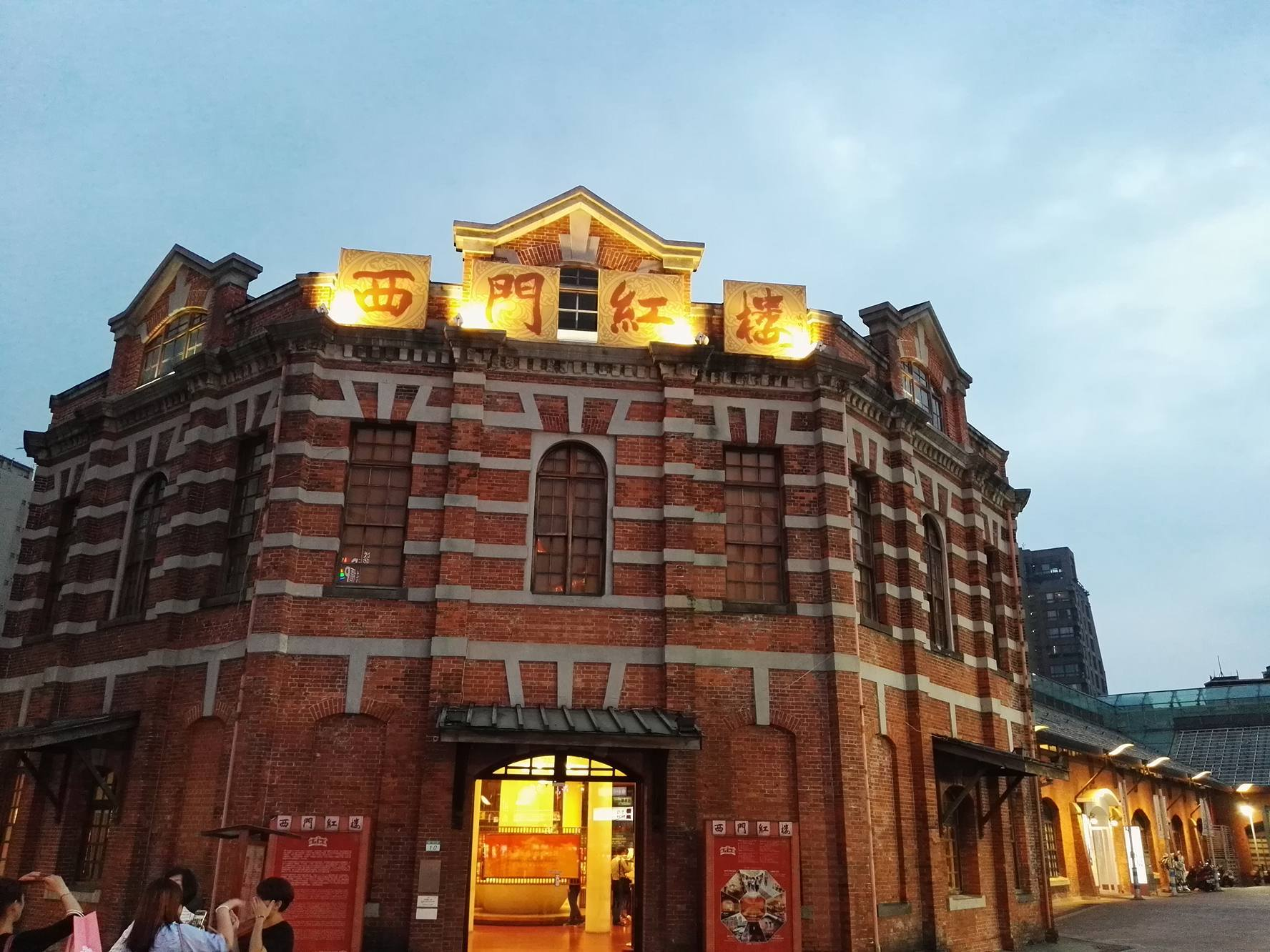 honglou grbäude 2